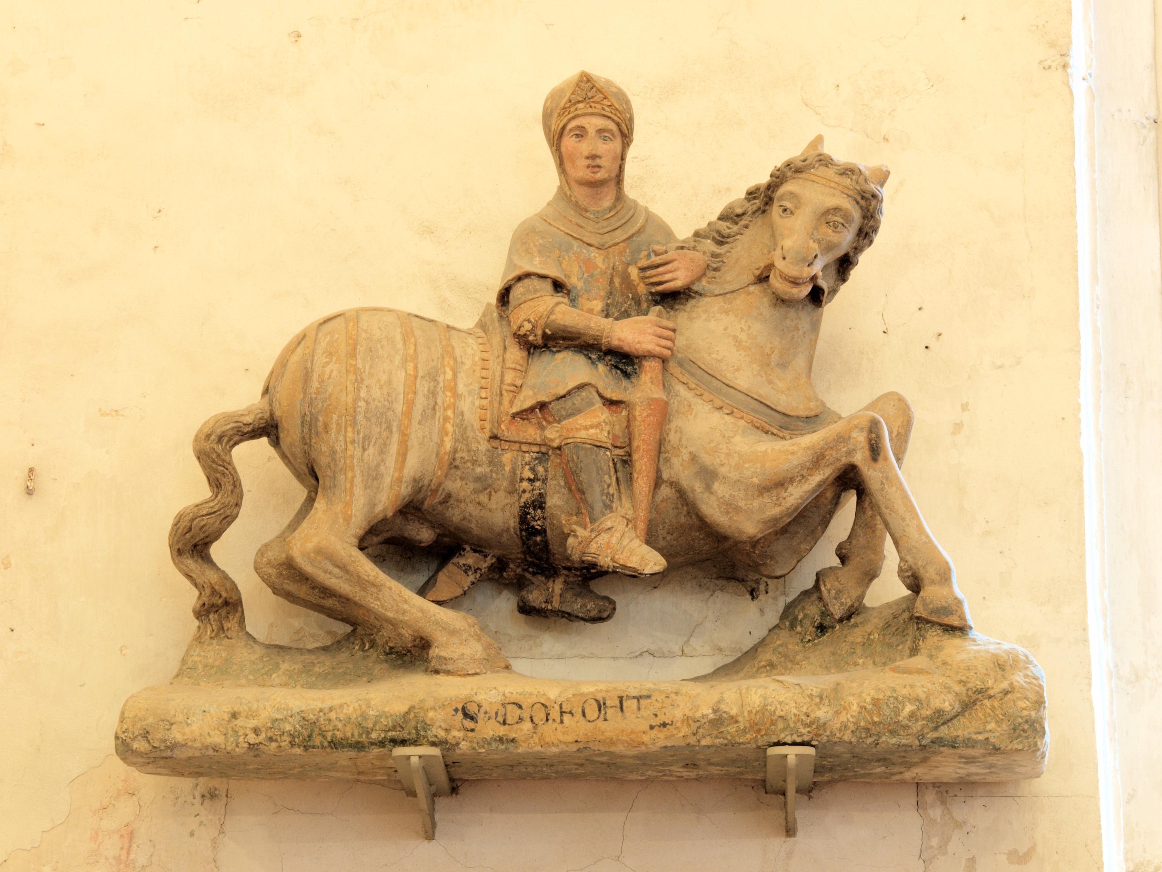 Église Saint-Gorgon-et-Saint-Dorothée de Véron (Yonne, France) ; l'intérieur. Statue équestre du soldat saint Dorothée.